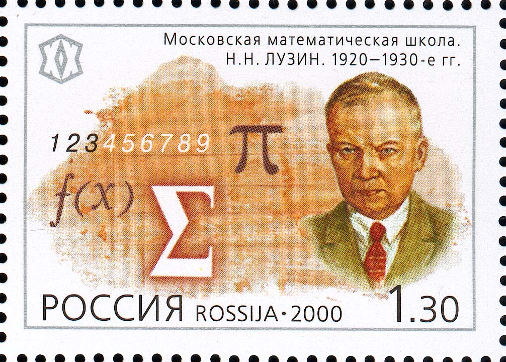 Н.Н. Лузин. Почтовая марка России